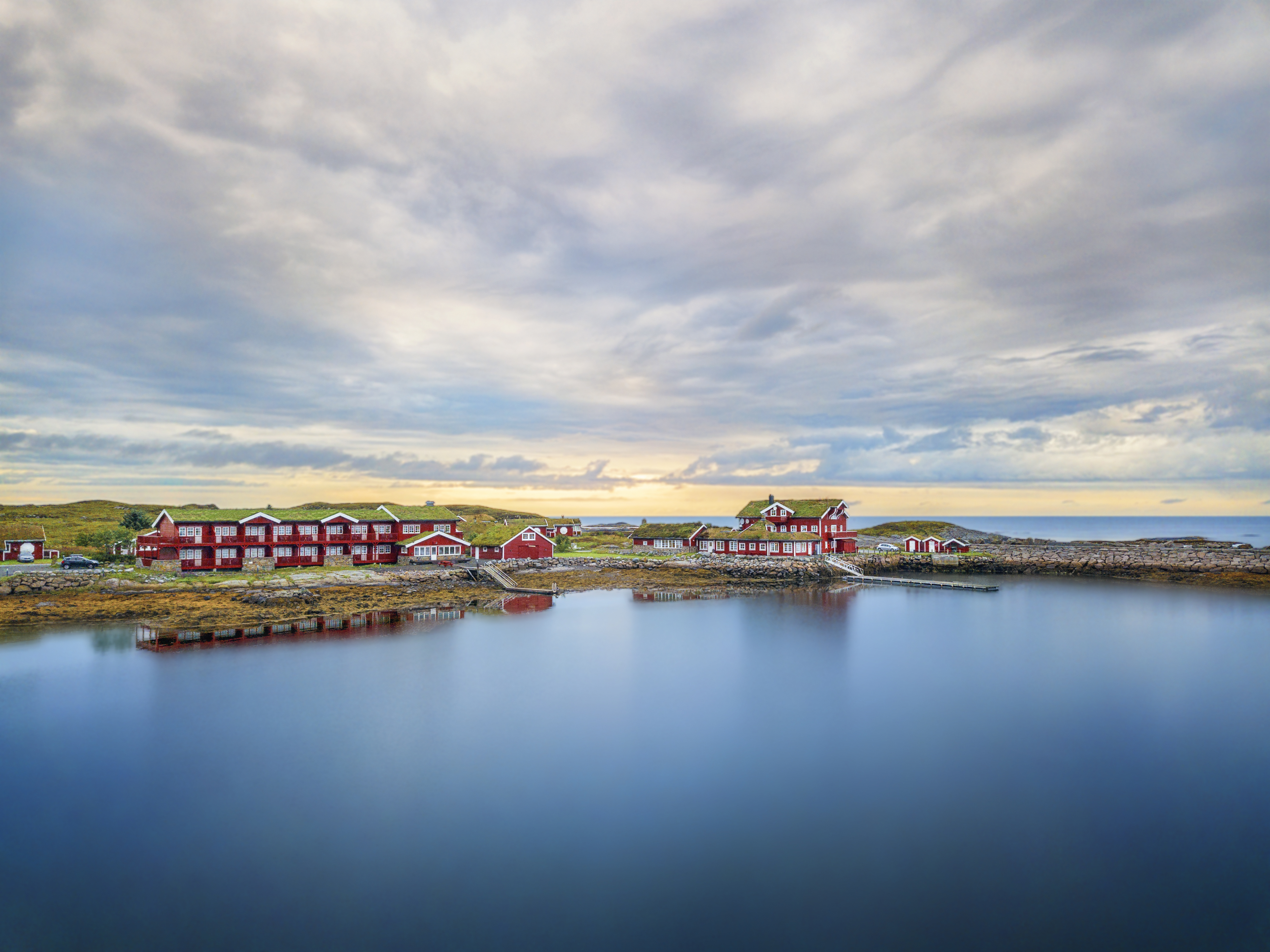 classicnorway.no